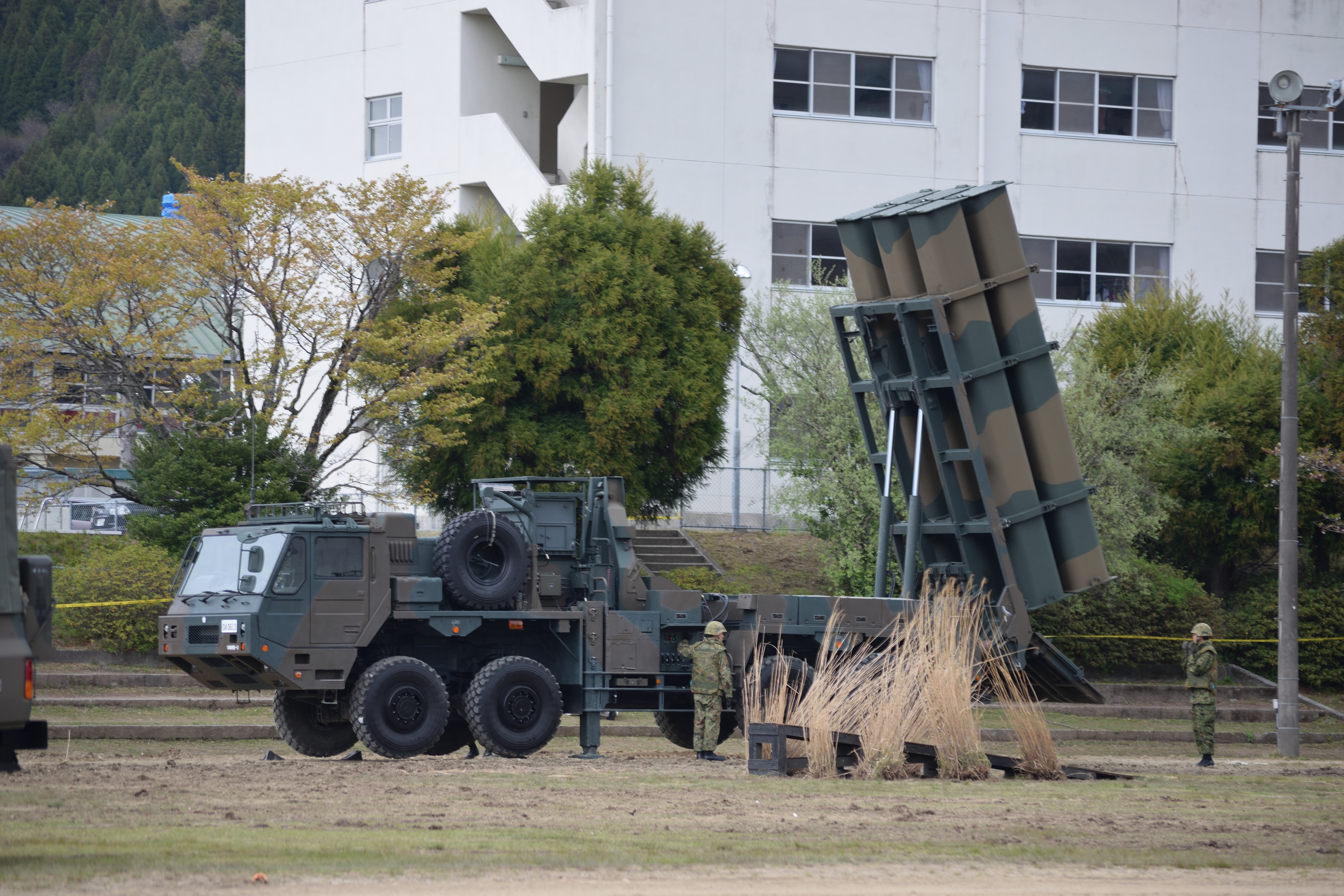 第5地対艦ミサイル連隊の訓練展示（湯布院駐屯地記念式典） Nikon D3300